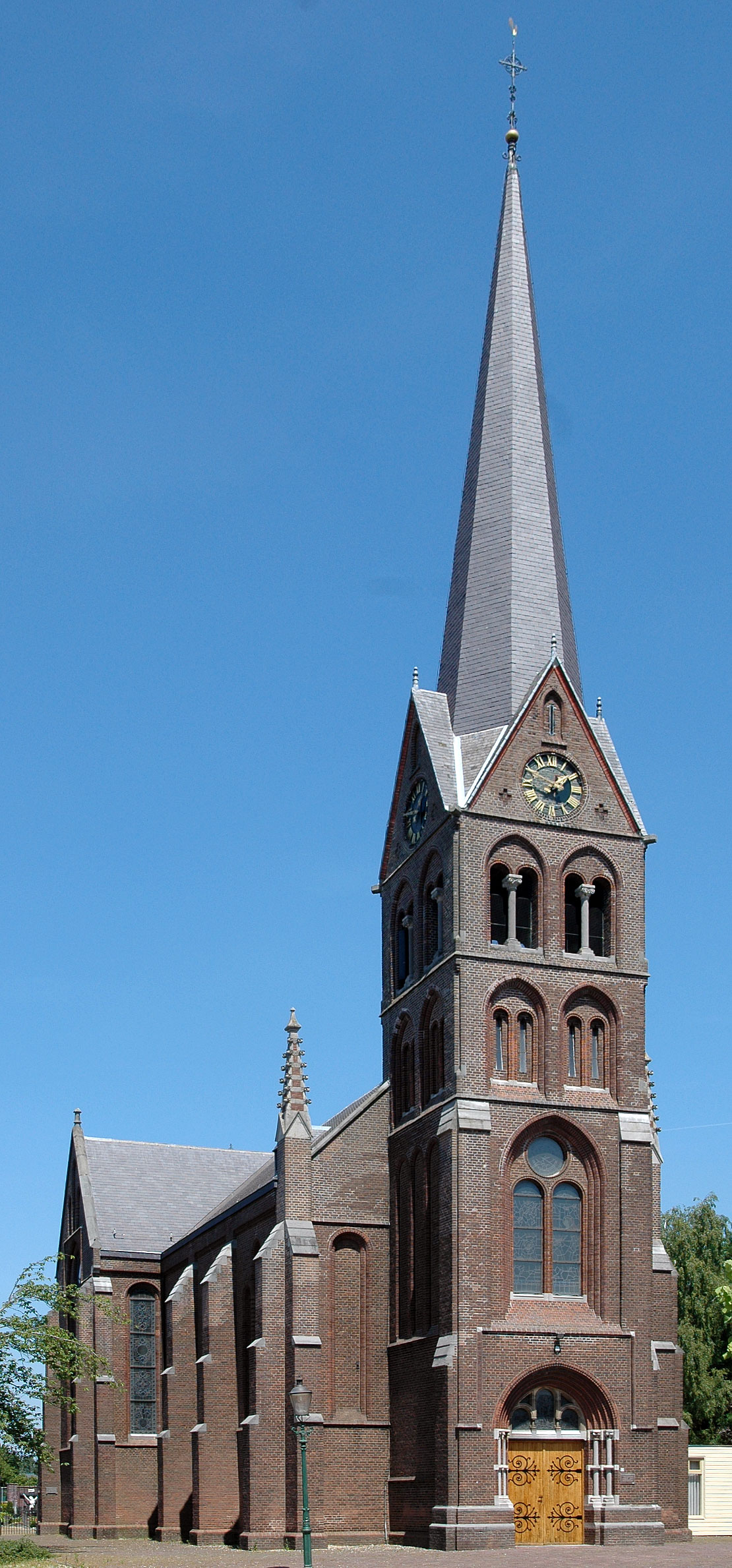 St. Lambertuskerk, Hoekstraat 46, Nederwetten, NL